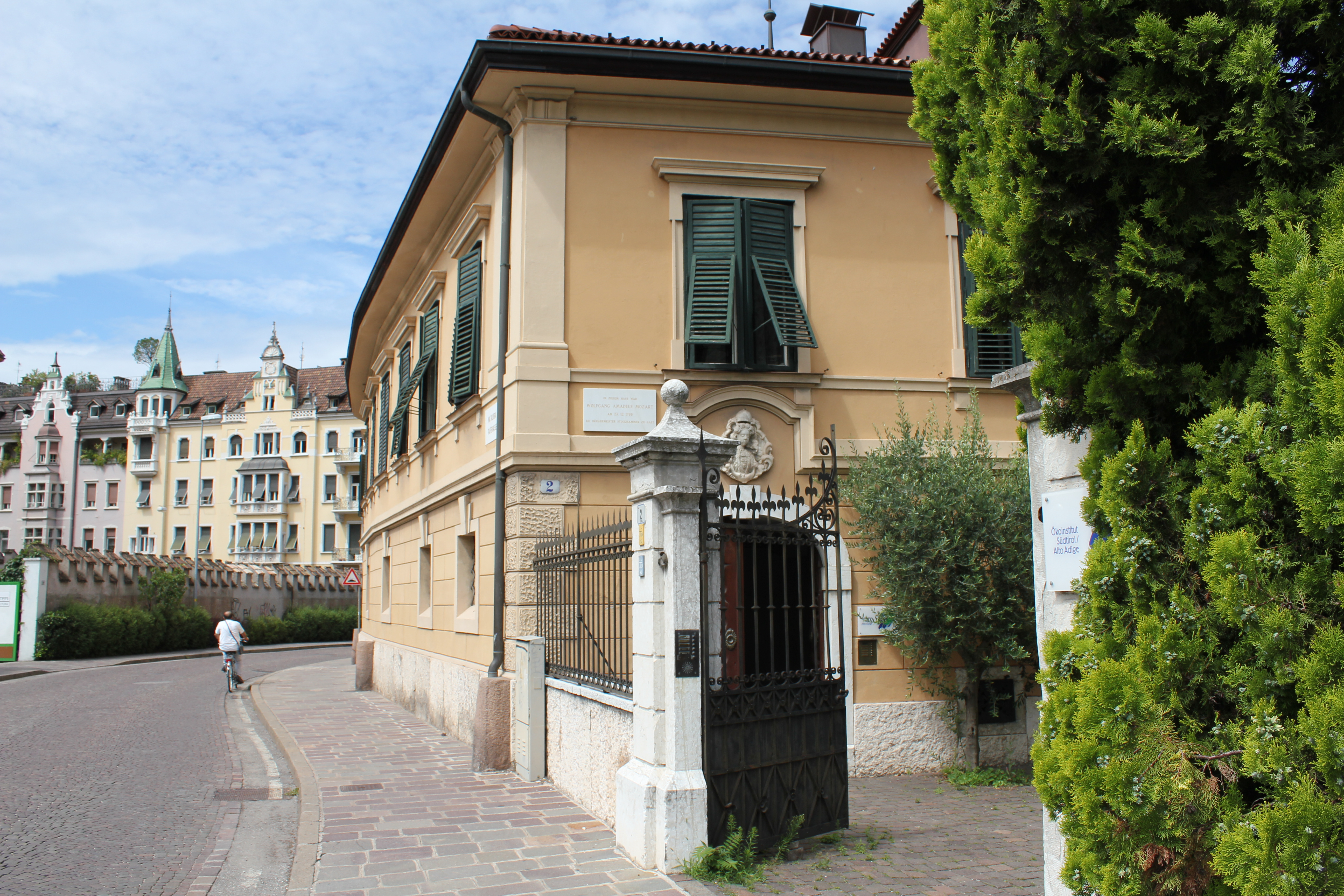 Haus Glauber - Sitz des Ökoinstituts Südtirol - Alto Adige